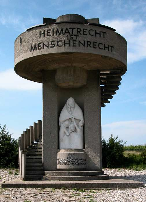 Denkmal für heimatvertriebene Südmährer - Bezirk Znaim an der Thaya Irredentist memorial for the Sudetenland ethnic Germans expelled from South Moravia.